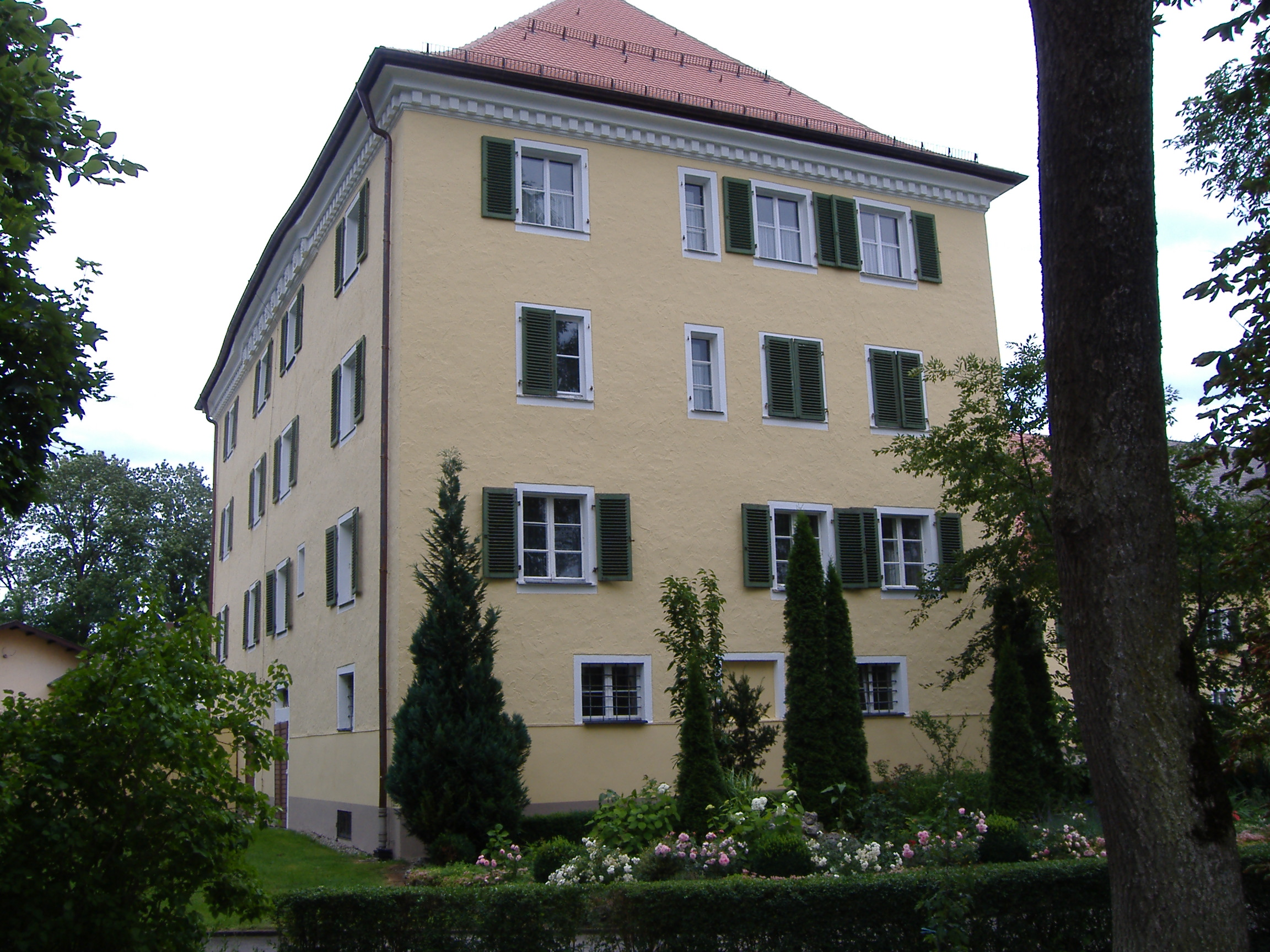 Schloss Fünfstettn